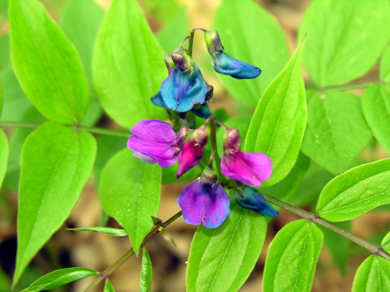 Pavasarinis pelėžirnis (Lathyris vernus) Šeima. Pupiniai (Fabaceae) Fotografavo: Algirdas, 2006 m. gegužės 13 d., Lietuva